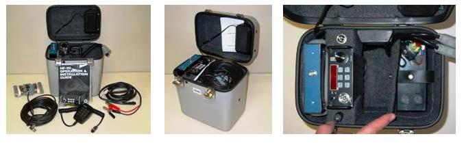 Secours en cas d'urgence et de catastrophe. Kit de radiocommunications de catastrophe. Homologué par le Comité international de la Croix-Rouge et par la Fédération internationale des Sociétés de la Croix-Rouge et du Croissant-Rouge. Conception de ce ManPack selon cahier des charges du Comité international de la Croix-Rouge pour ce type d'équipement de secours. Avec un émetteur-récepteur Q MAC de 30 W Batterie d'accumulateurs 12 VDC, 7Ah intégrée, rechargeable par panneau solaire, et toute autre source VDC inférieure ou égale à 25 VDC. Possibilité d'alimentation extérieure et de recharge de l’accumulateur depuis: batterie voiture, camion, panneau solaire. Protégé contre les branchements en polarité inversée. Antenne dipôle avec coaxial, prête pour un déploiement immédiat, ou une antenne mono-pôle (fil unique) de 15 mètres avec boite d'accord automatique et coaxial. Accord automatique d'antenne systématiquement fait sur toutes fréquences HF dès le déclenchement de la transmission. Ensemble compacte résistant aux chocs, à la pluie ou aux éclaboussures. Poids : le plus léger possible.